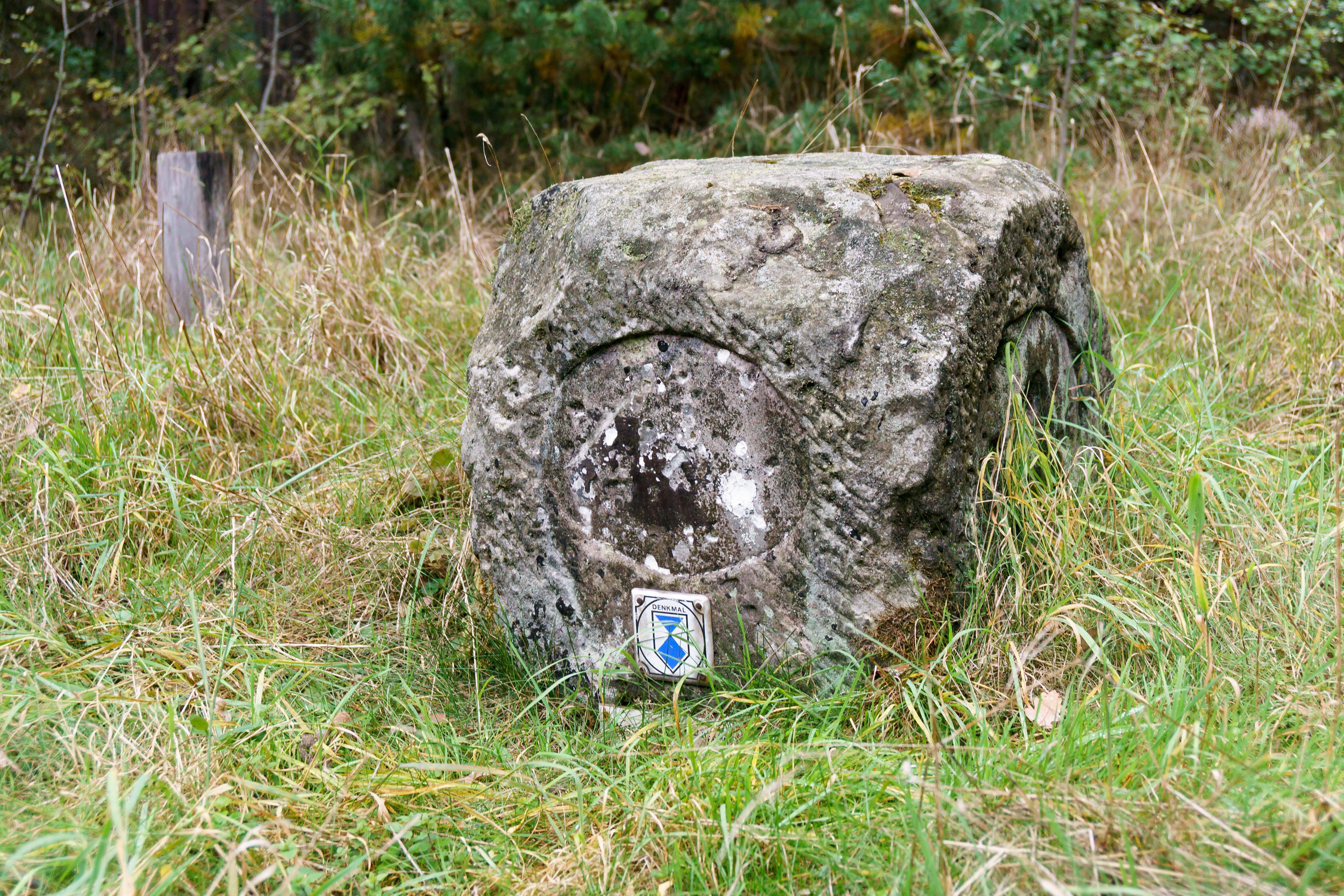 Preußischer Viertelmeilenwürfel (0297) an der L 1, Seepromenade in Arendsee.